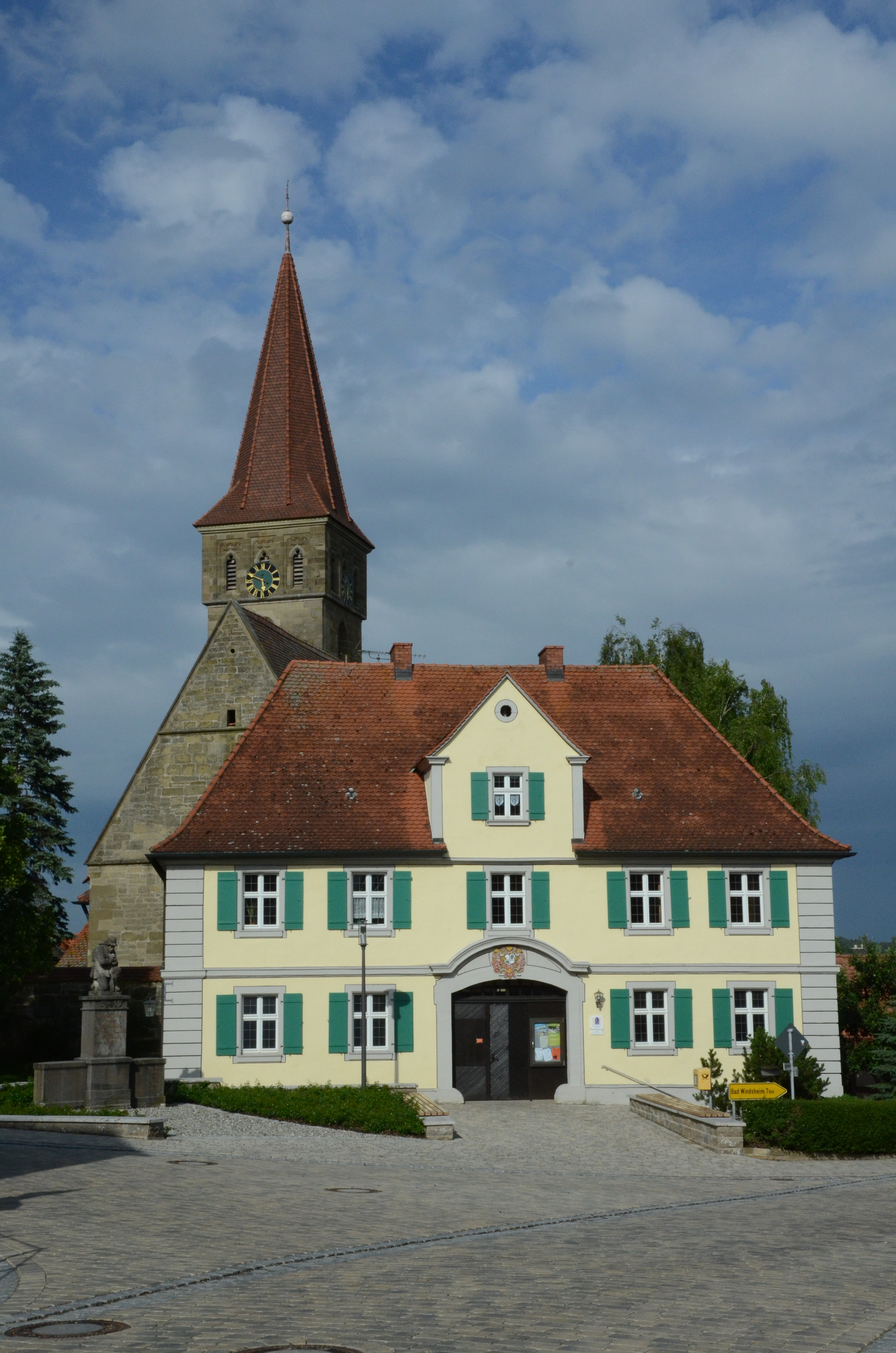 evang.-luth. Kirche St. Ursula in Ergersheim